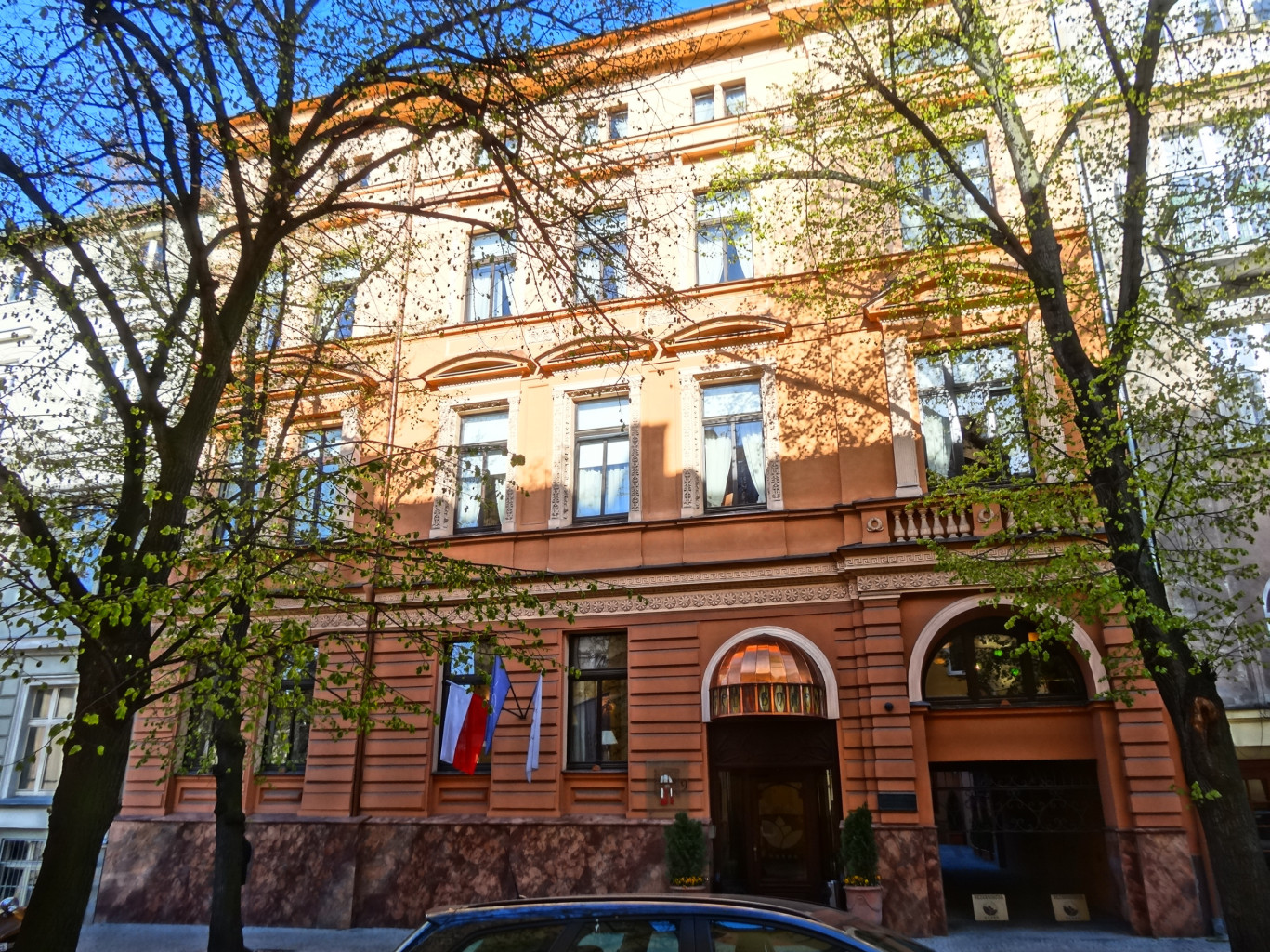 Hotel Bohema w Bydgoszczy *****, w kamienicy przy ul. Konarskiego (1877)